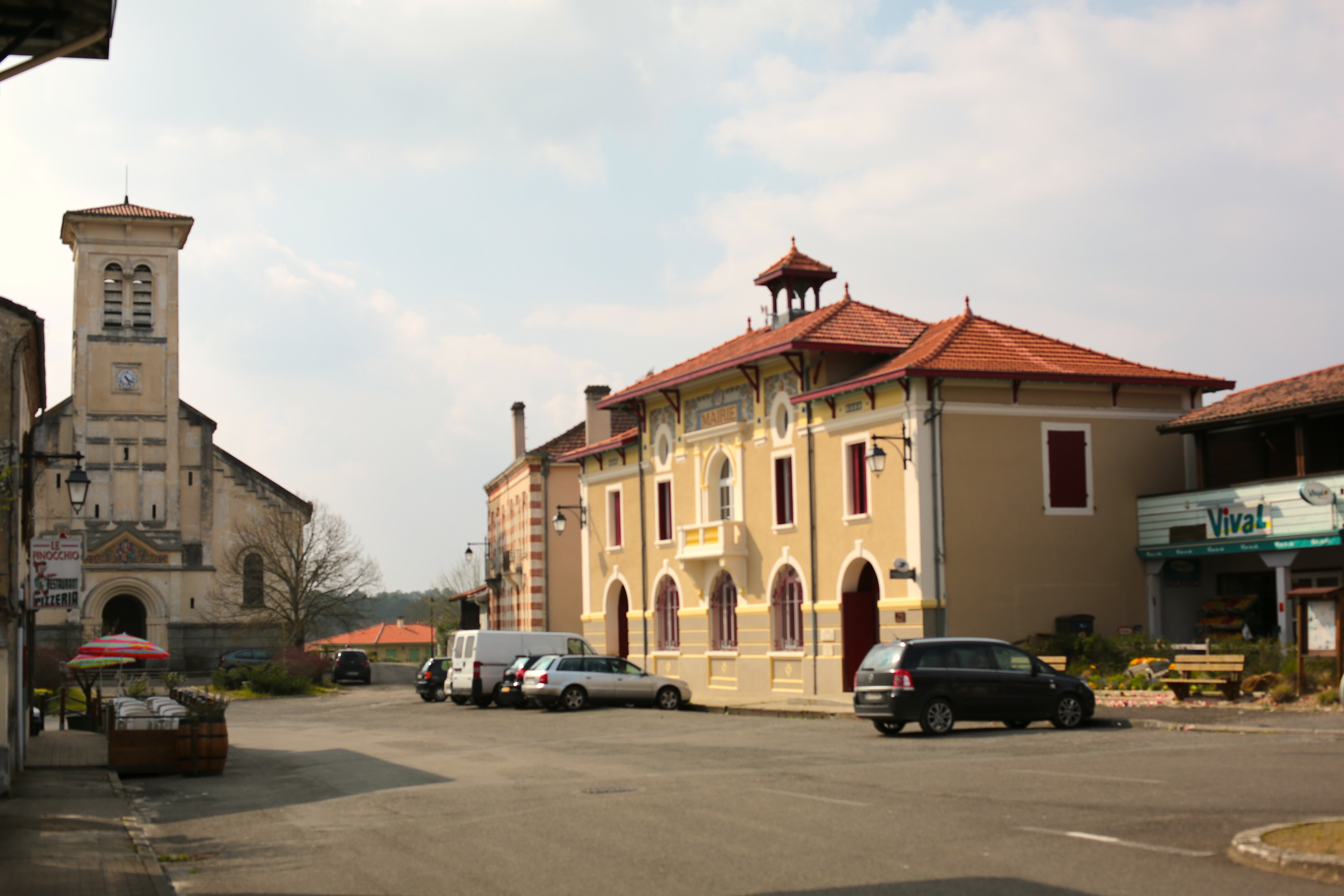 Eglise et place de la mairie de Brocas